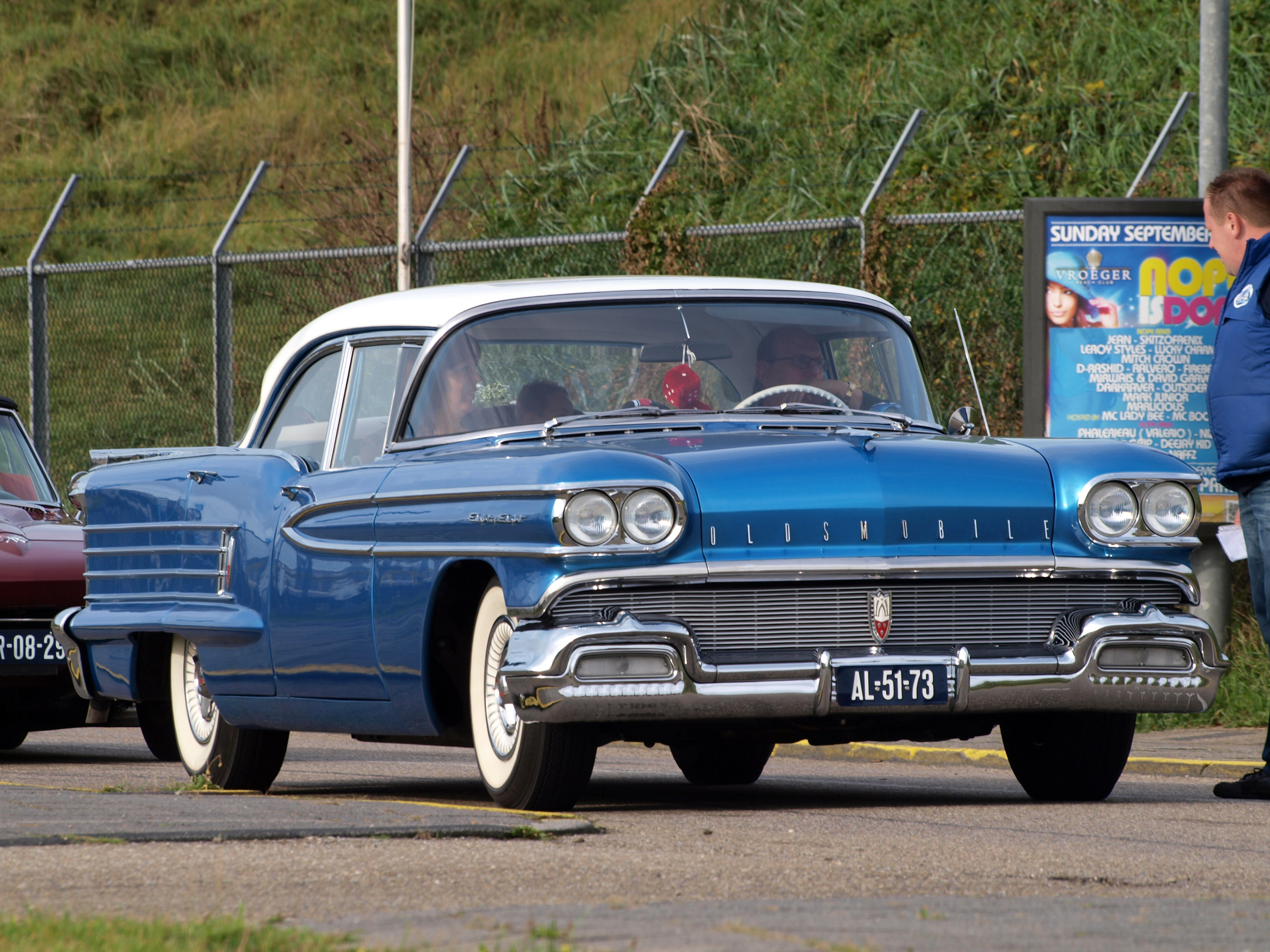 Nationaal Oldtimer Festival Zandvoort 2011.